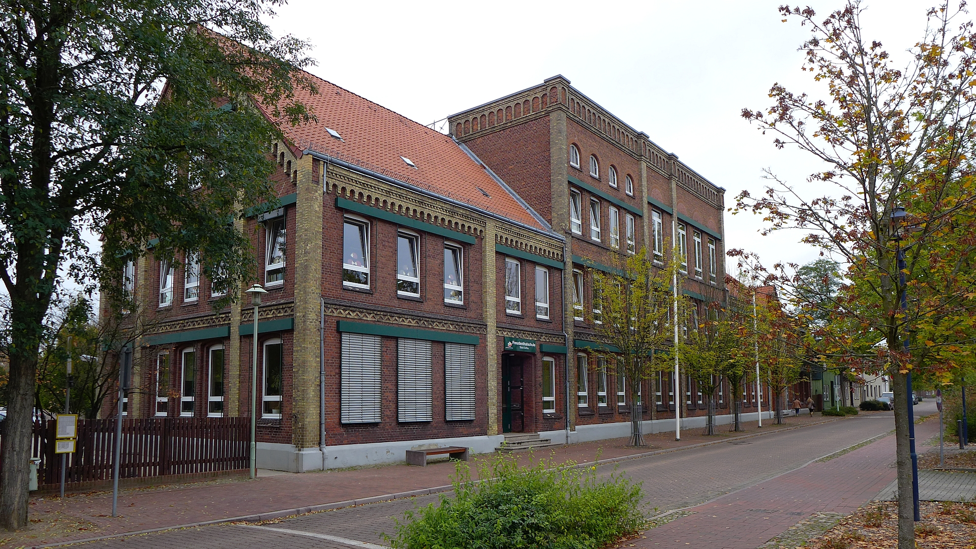 Freudenthalschule in der Mühlenstraße, Innenstadtbereich von Soltau.